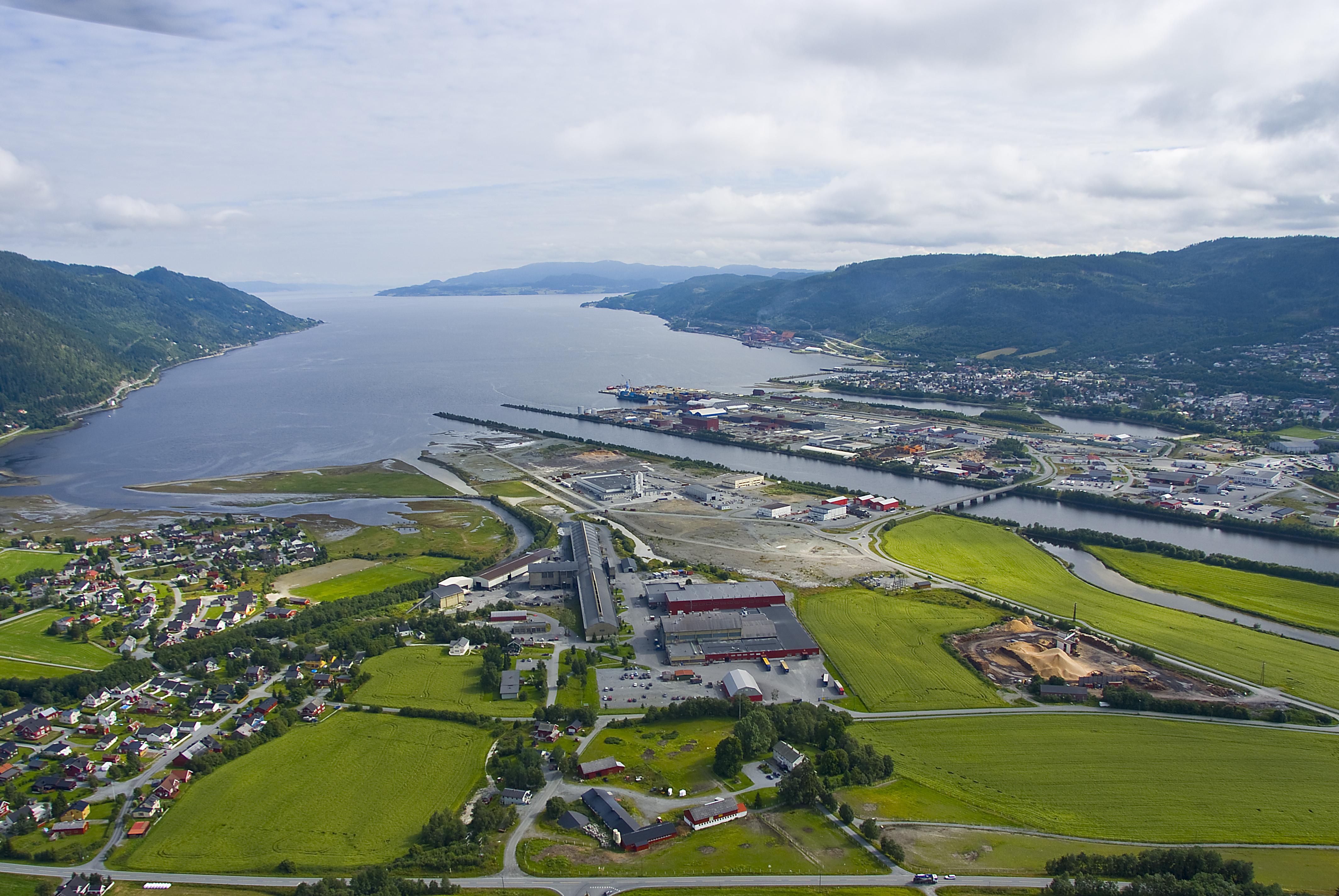 Foto: Trondheim Havn/Åge Hojem